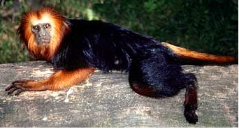 mico-leao-dec